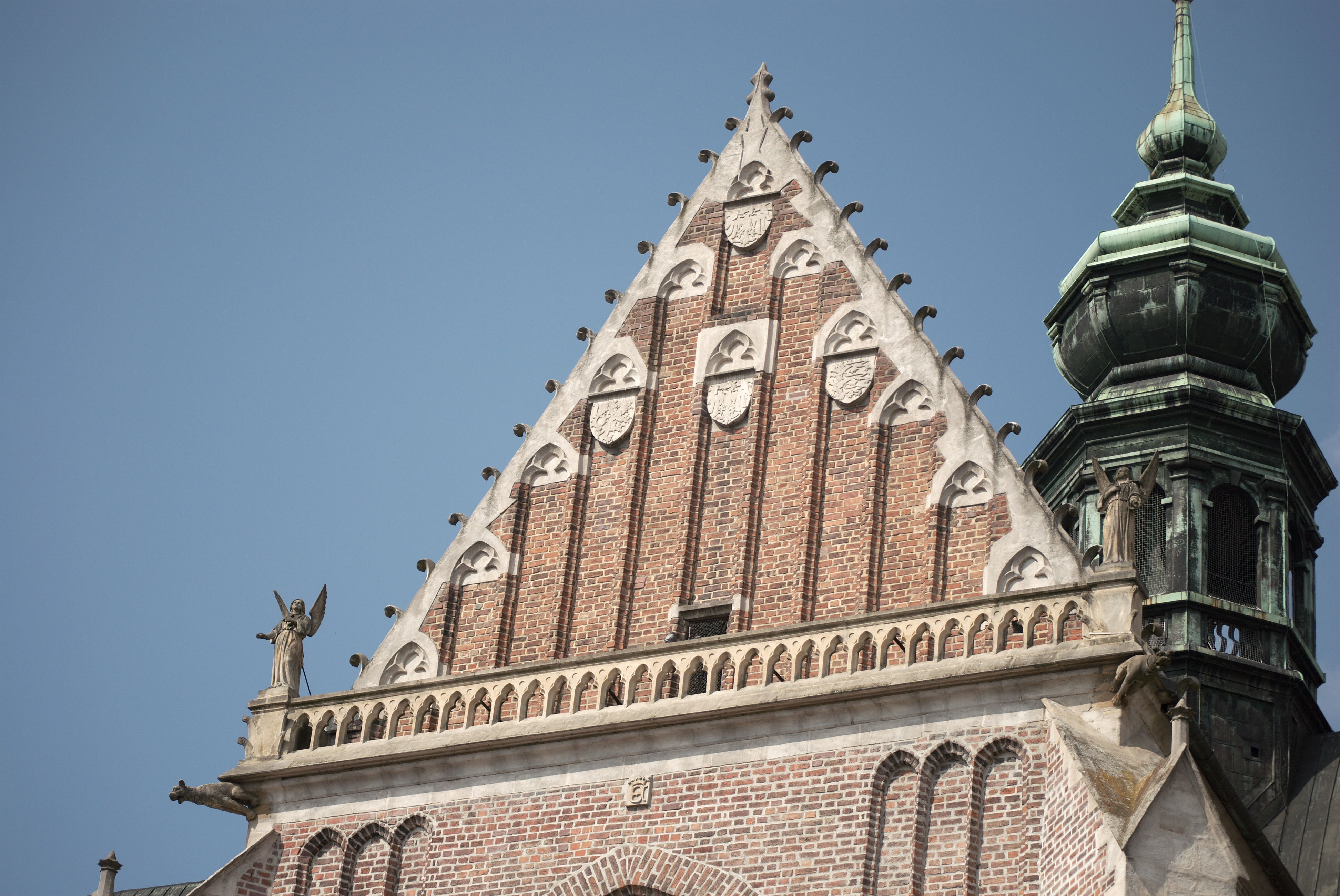 Staré Brno - štít nad vstupním portálem do baziliky Nanebevzetí Panny Marie